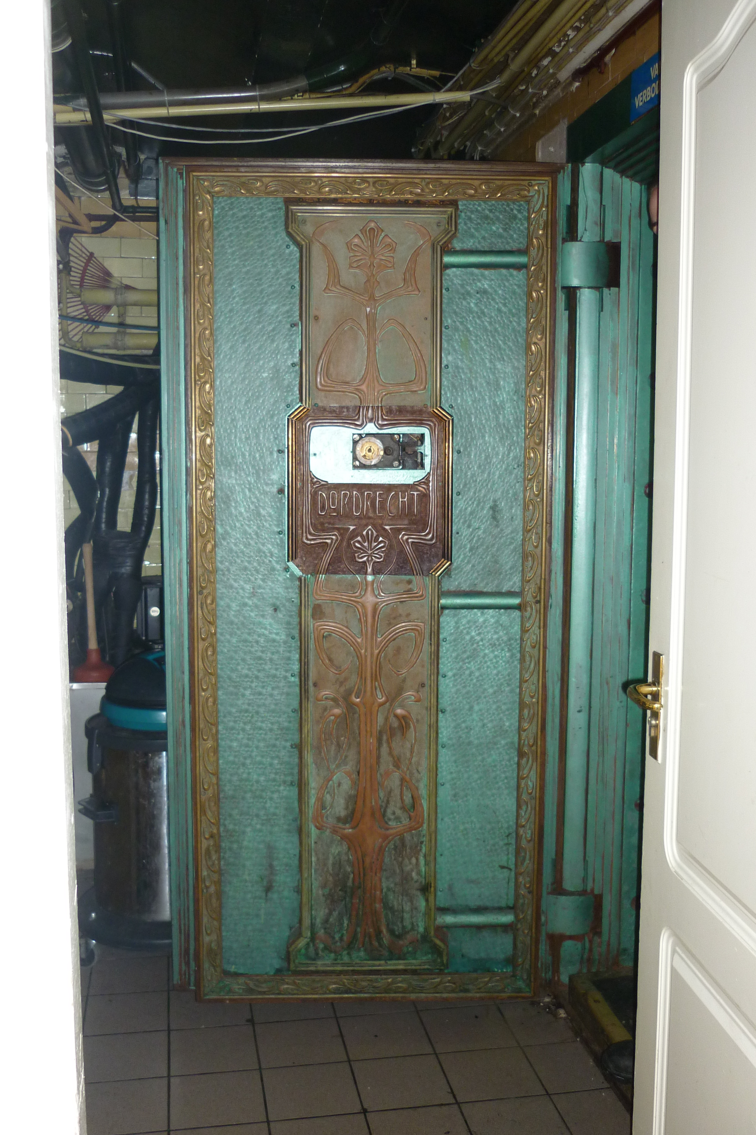 De Haagsche Kluis, kluisdeur